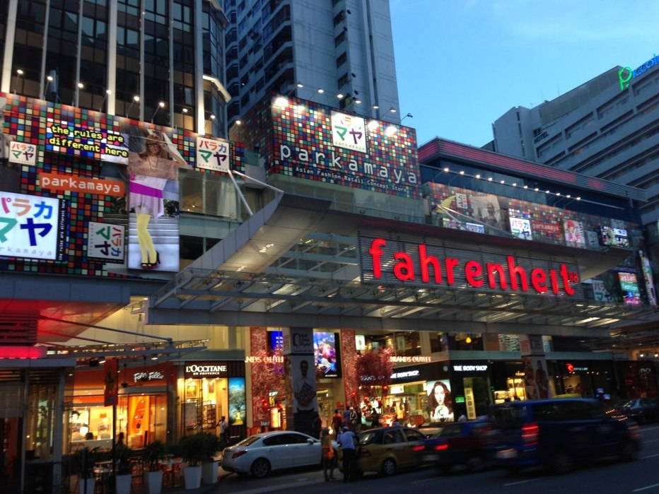 Fahrenheit 88 Facade in 2014